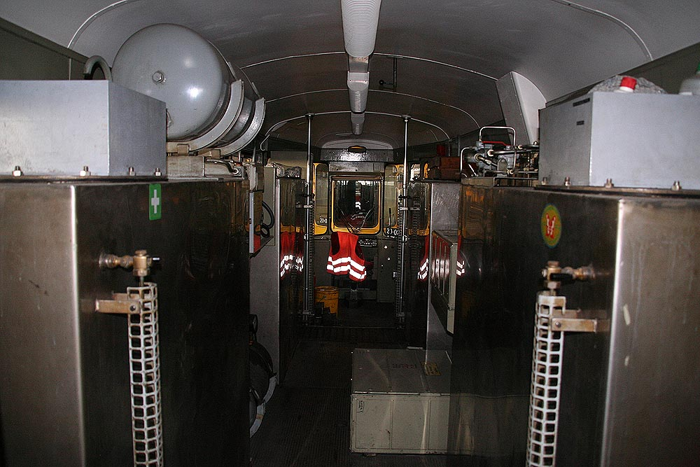 Innenraum des Schienenschleifwagens 2002 mit Wassertanks und weiteren Aggregaten